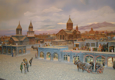 Հին Գյումրի